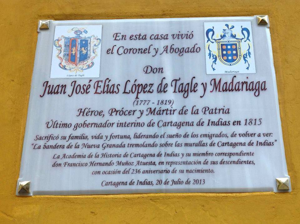 Placa ubicada en la ciudad de Cartagena de Indias, en el sector amurallado (ciudad vieja), en la calle de Santo Domingo, en la casa del conde de Pestagua (su abuelo materno), donde vivieron él y sus hermanos, tras la temprana muerte de sus padres.